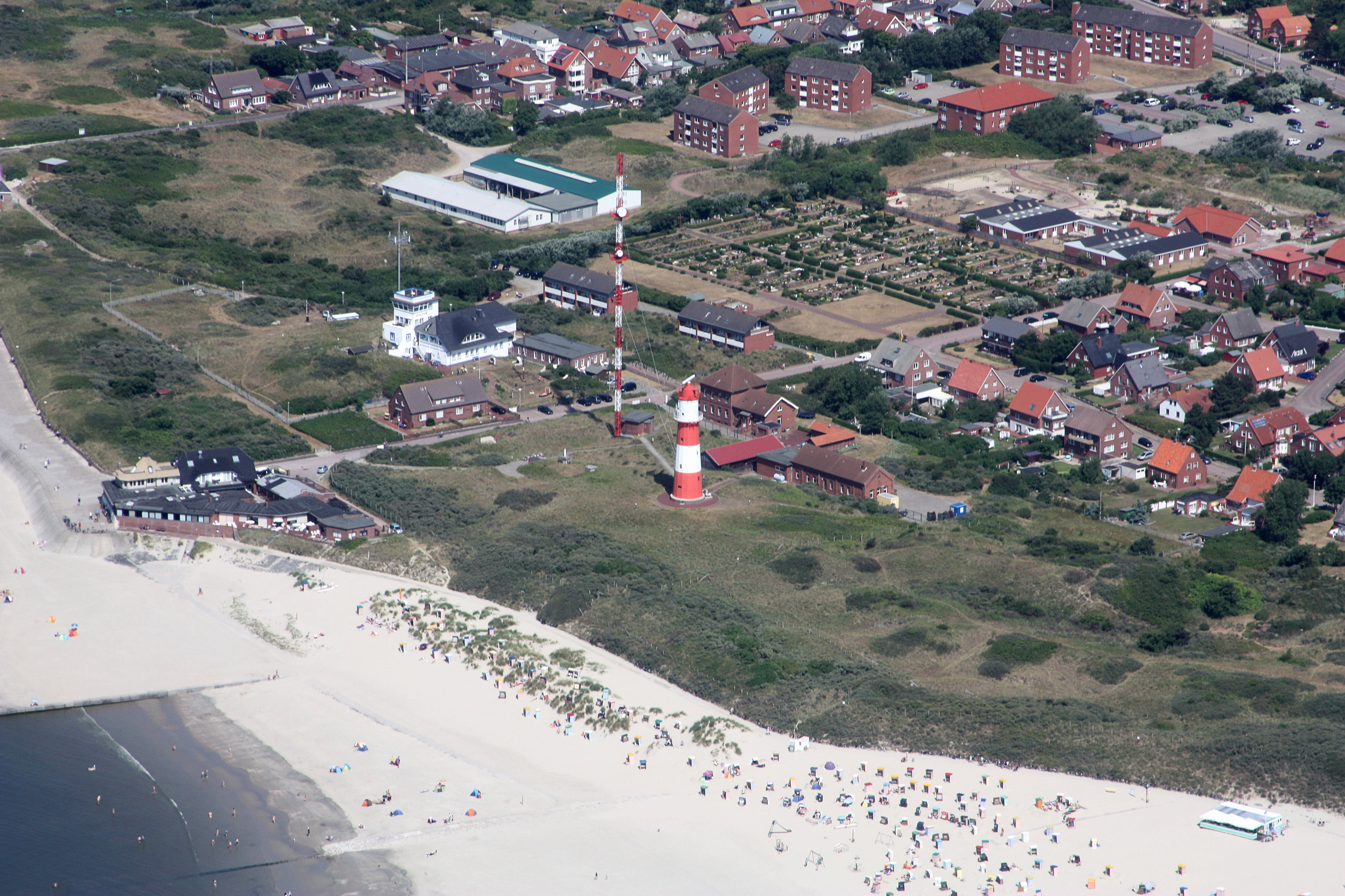 Flug über Borkum; Flughöhe 1500 ft; Juli 2010; Originalfoto nachbearbeitet: Tonwertkorrektur und Bild geschärft mit Hochpassfilter